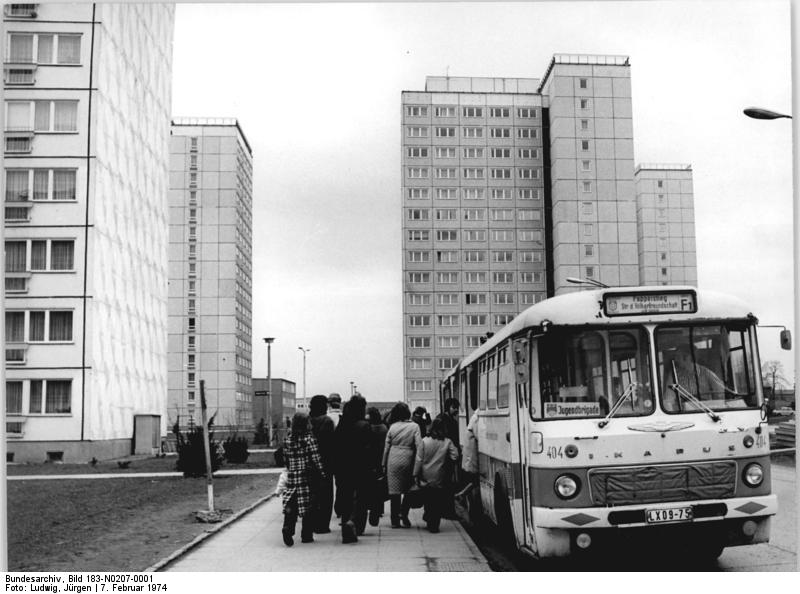 Erfurt, Rieht, Wohnhochhäuser, Omnibus ADN-ZB Ludwig-7.2.1974 Erfurt: Bis dicht an das neue Wohnzentrum Rieht in Erfurt führt das erweiterte Verkehrsnetz heran. Unser Foto zeigt eine Omnibushaltestelle in der Vilniuser Straße. Die Bauarbeiter des Wohnungsbaukombinates Erfurt und ihre Kooperationspartner wollen im ersten Quartal 1974 1034 Wohnungen bauen. Damit knüpfen sie an die guten Leistungen in der Vergangeheit an. Insgesamt wollen die Werktätigen des WBK in diesem Jahr über 3900 Wohnungen, 1260 Kindergarten- und über 600 Kinderkrippenplätze errichten. Schulklassen, Einkaufsstätten u.a. runden das Programm ab. Information added by Wikimedia users. Das Hochhaus ist vom Typ Punkthaus Wohnbaureihe Erfurt (WBR Erfurt). Entwickelt 1969 vom VE Wohnungsbaukombinat Erfurt, Entwurf: Gert Widder, Günther Hähndel, Käthe Schul, Lutz Braumbach